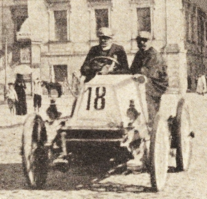 Henri Fournier, vainqueur de Paris-Bordeaux 1901 sur Mors (et record du monde de l'heure avec 86 km) - La Vie au Grand Air du 19 janvier 1902, p.37